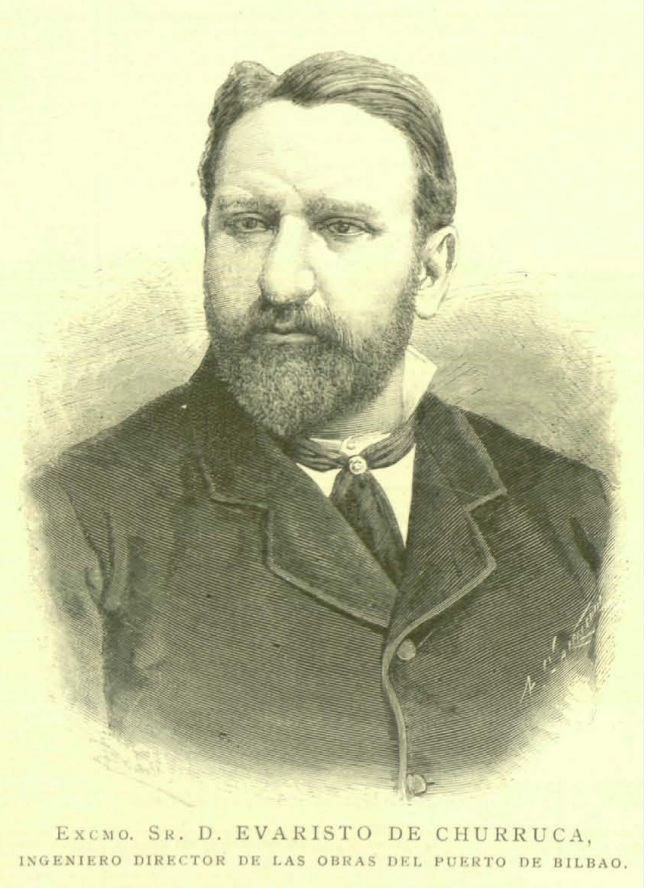 Excmo. Sr. D. Evaristo de Churruca. ingeniero director de las obras del puerto de Bilbao.